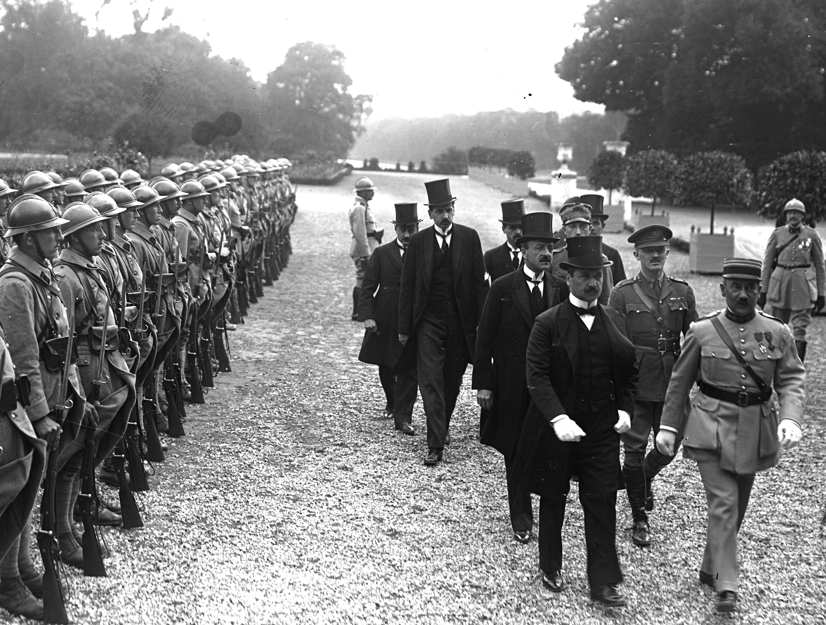 Cérémonie de signature du traité de Trianon : à l'avant en haut-de-forme Ágost Benárd, chef de la délégation hongroise, passant devant un piquet d'honneur à Versailles.